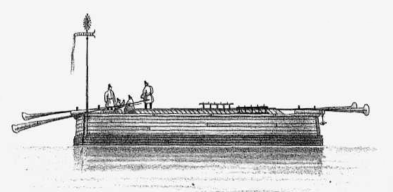 Коломенка